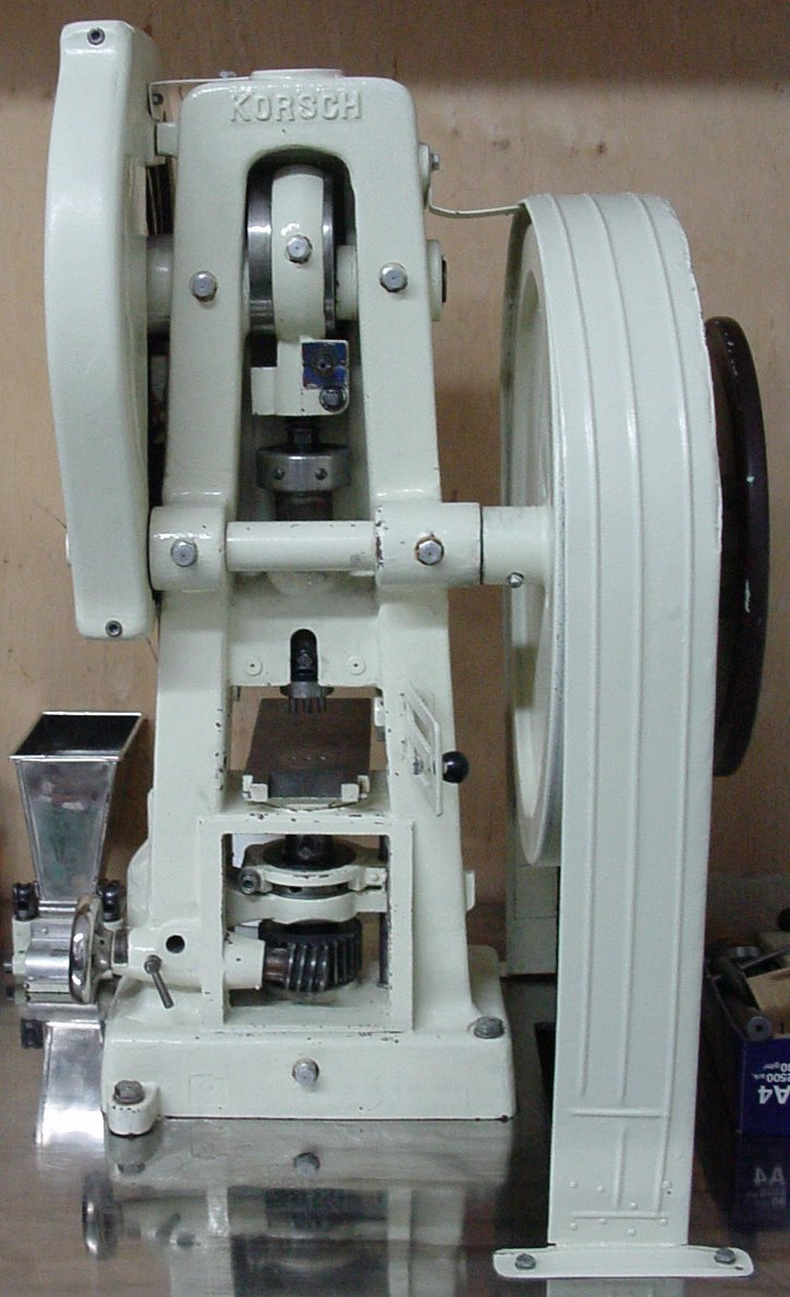 Tabletkarka uderzeniowa na wyposażeniu katedry Technologii Postaci Leku na Uniwersytecie Medycznym w Poznaniu.